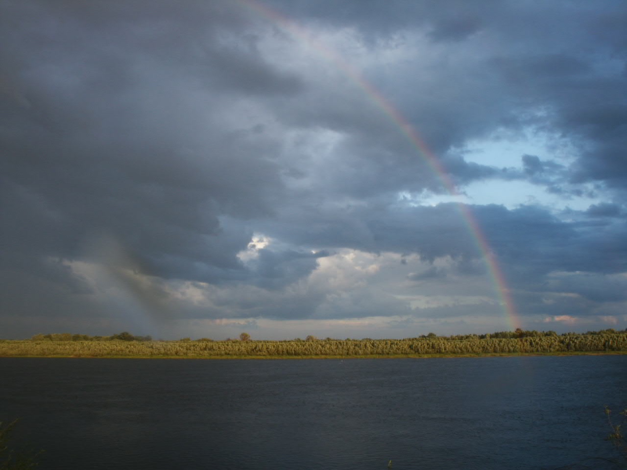 Воютино